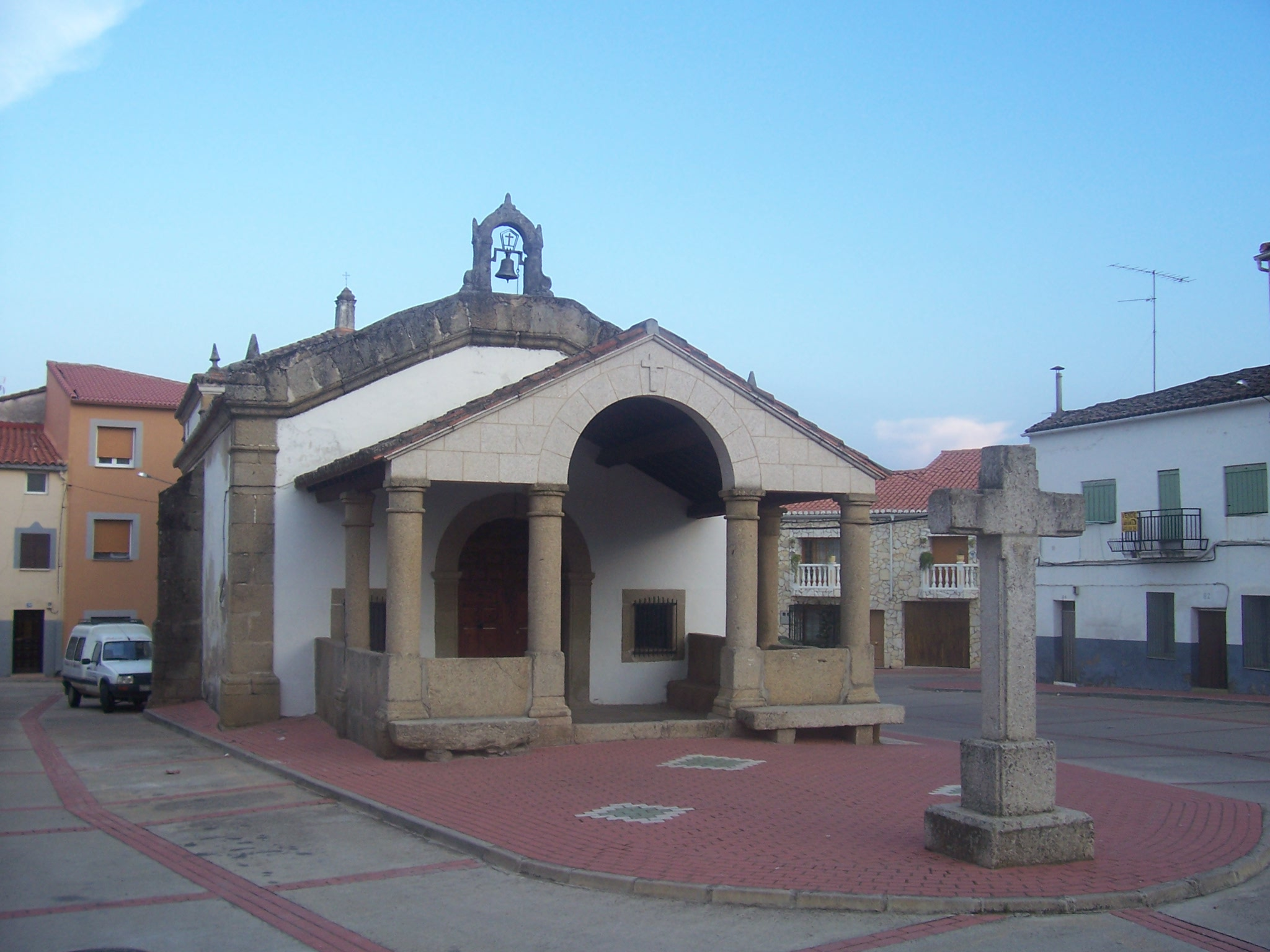 Ermita del Santísimo Cristo de los Remedios, en Montehermoso, Cáceres, España